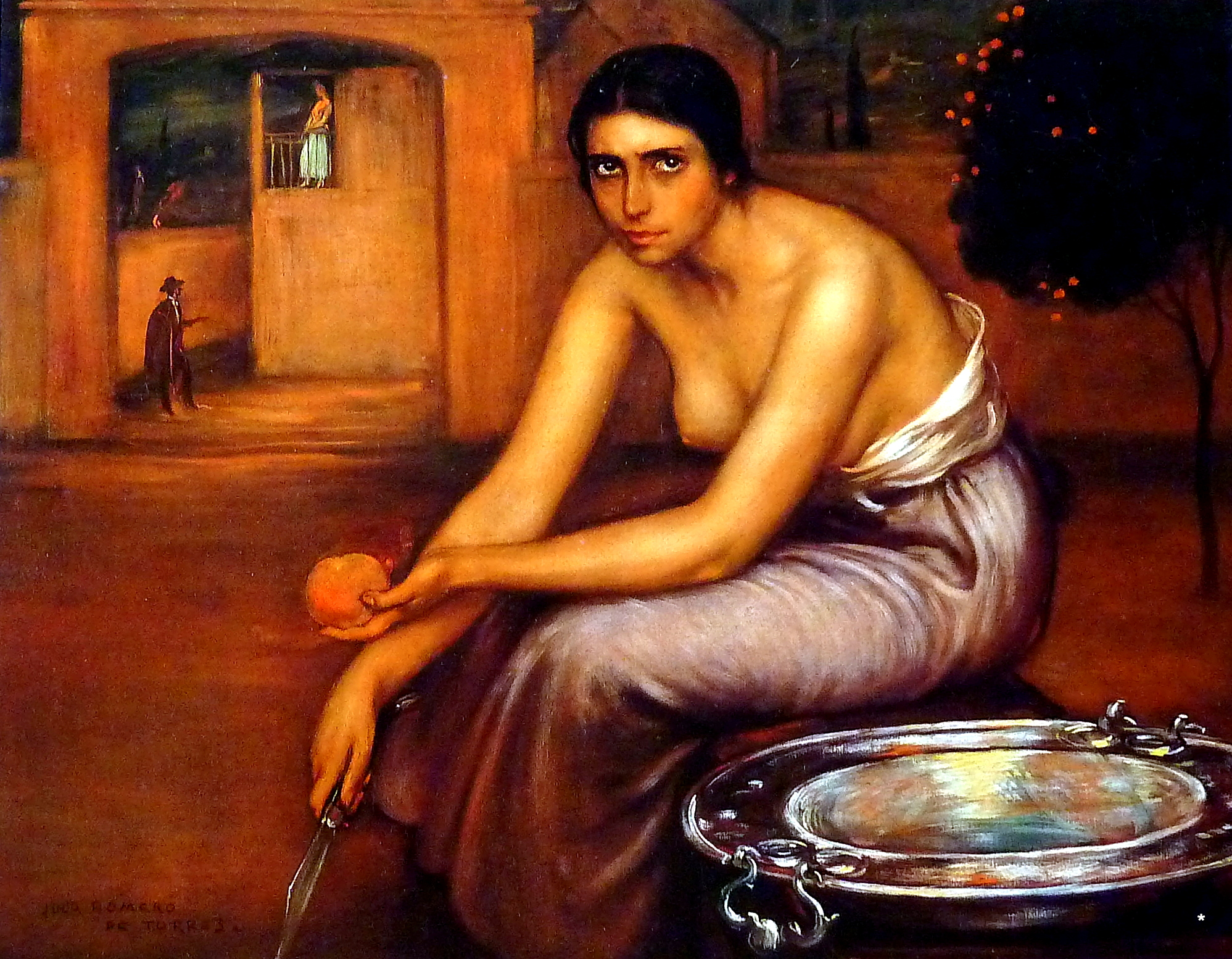 Celos. 1920. Julio Romero de Torres. Óleo y temple sobre lienzo. 82 x 104 cm. Colección particular